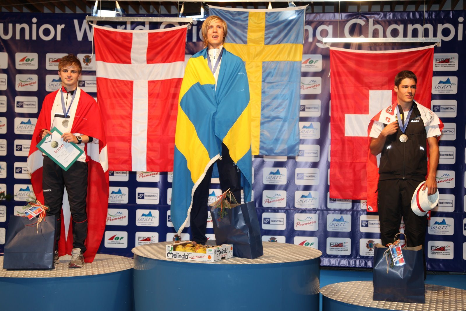 Winners of JWOC 2009 (Long) 1) Gustav Bergman 2) Søren Bobach 3) Martin Hubmann